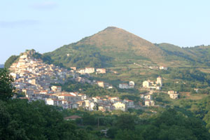 Vista di Bonifati. Luglio 2006, immagine personale. Pubblico dominio.